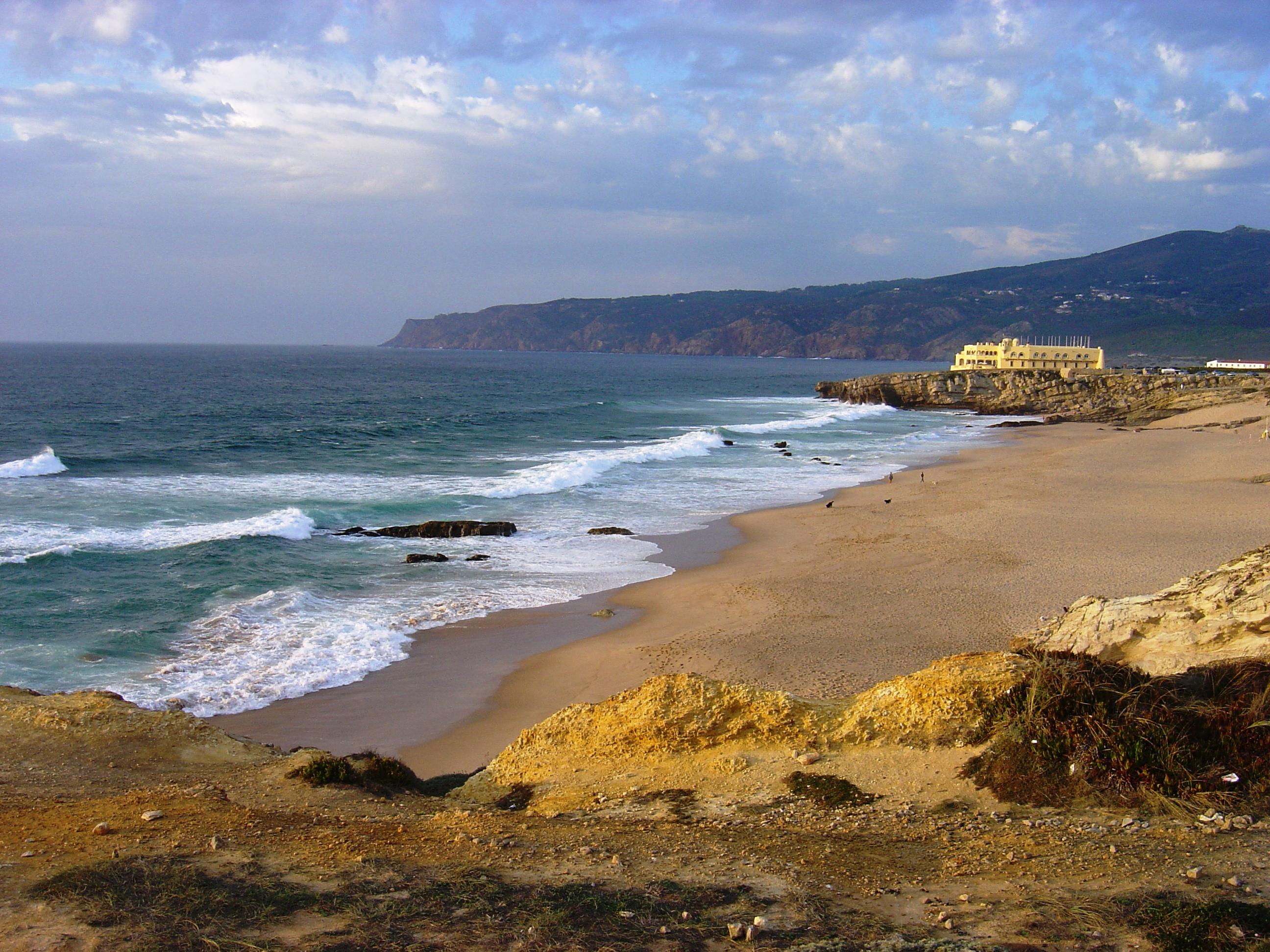 Cresmina Beach, Cascais, Portugal